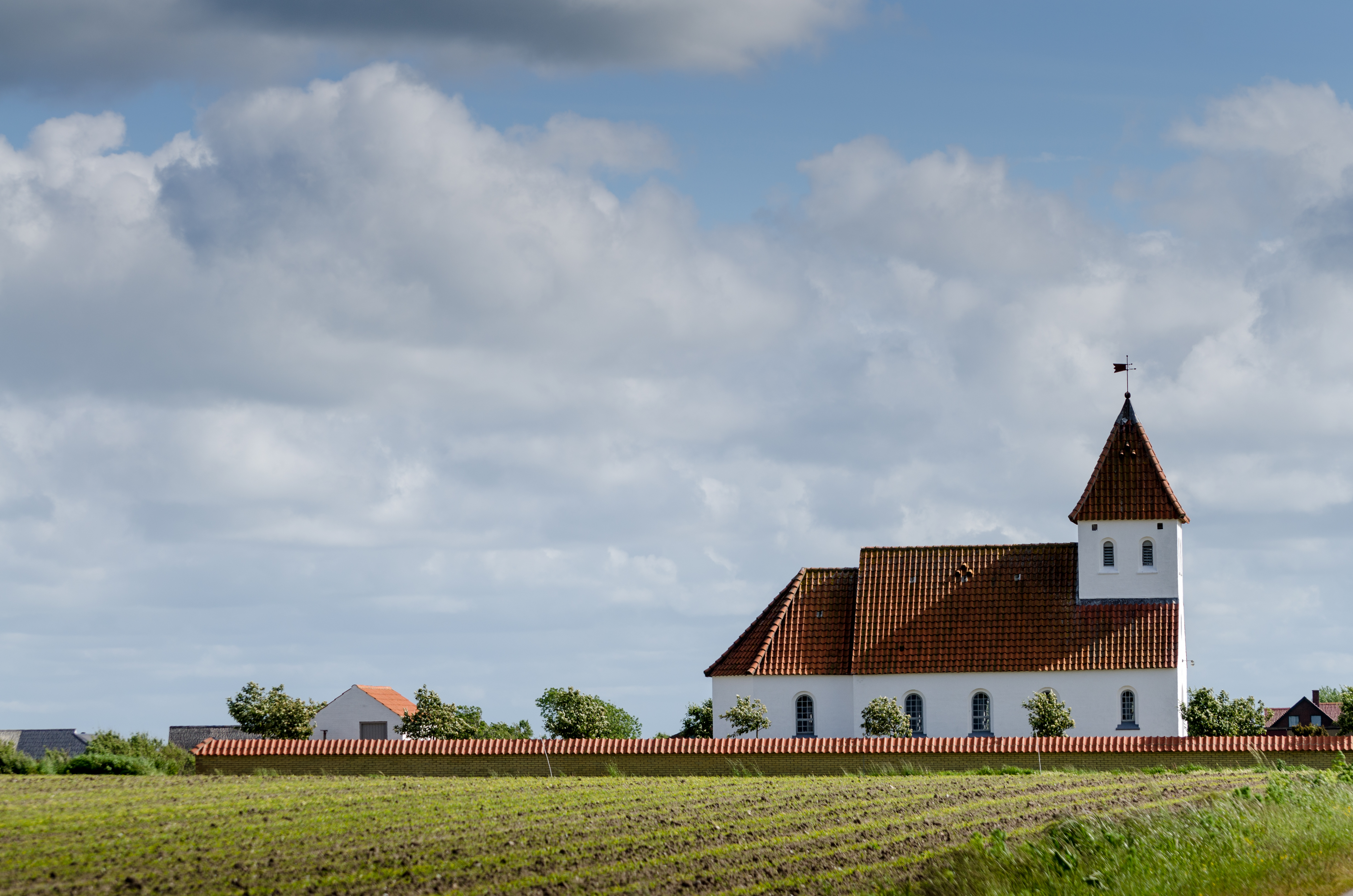 Kerk van Agerø op het eiland Mors